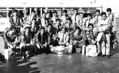 کاروان تیم تاج در فرودگاه مهرآباد بعد از قهرمانی در جام میلز هند، ۱۳۴۸